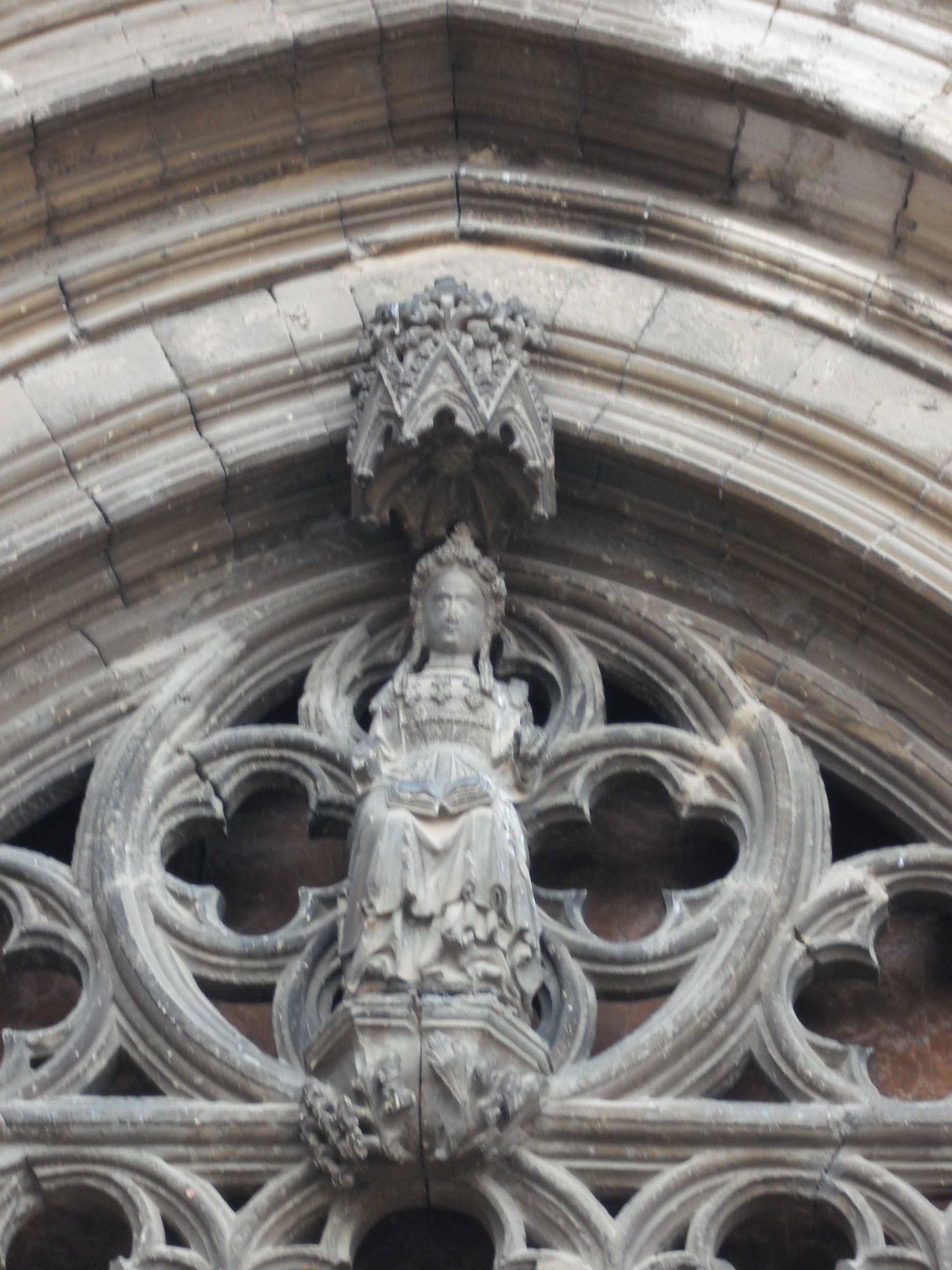 Una dona llegint amb un llibre damunt les cames, es una mica sorprenent quan parlem del segle XIII